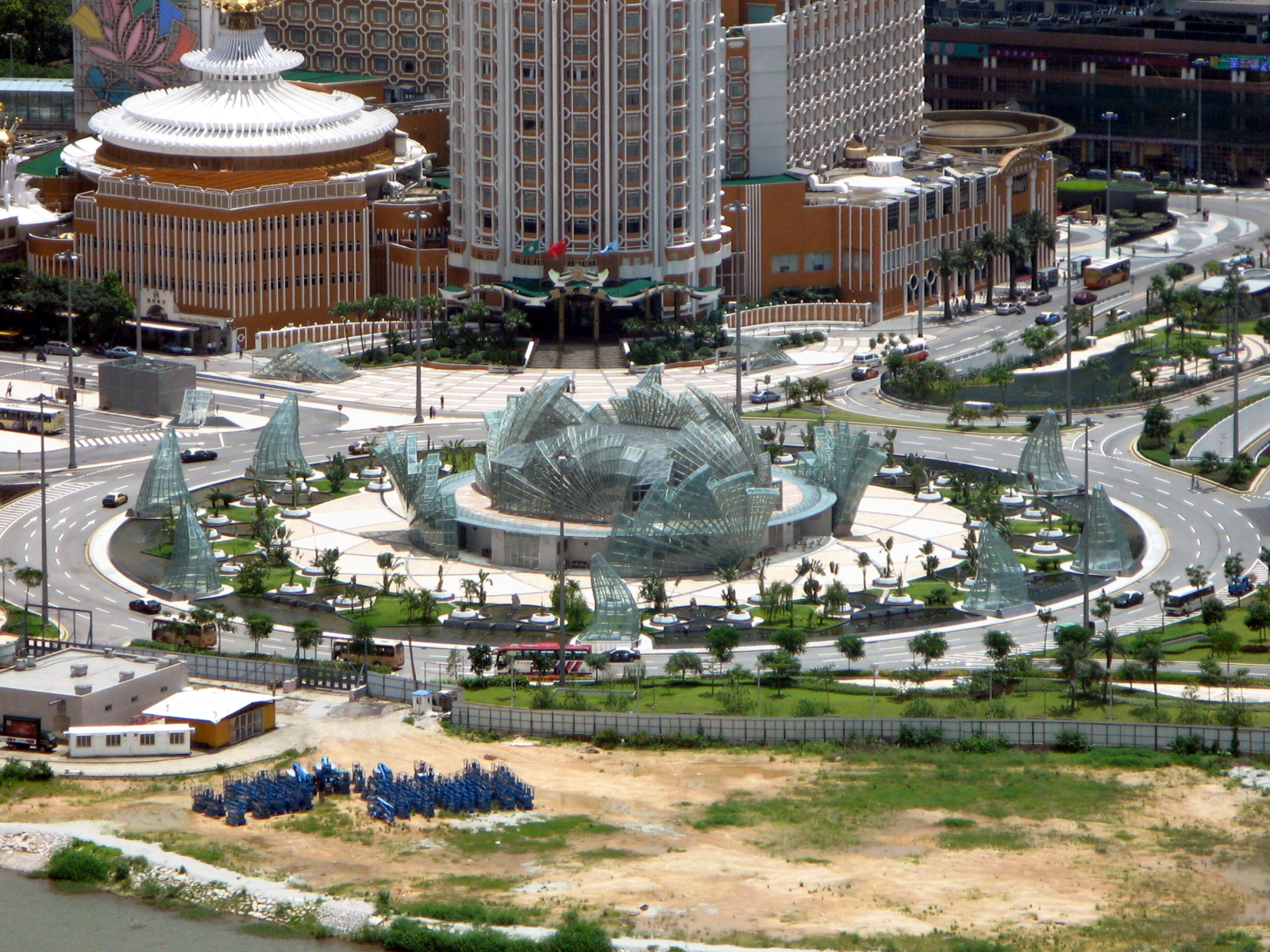 Praca de Ferreira do Amaral 亞馬喇前地